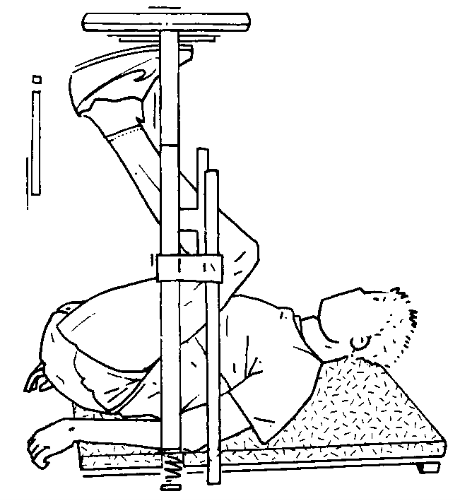 Musculation exercice squats couché 1.png